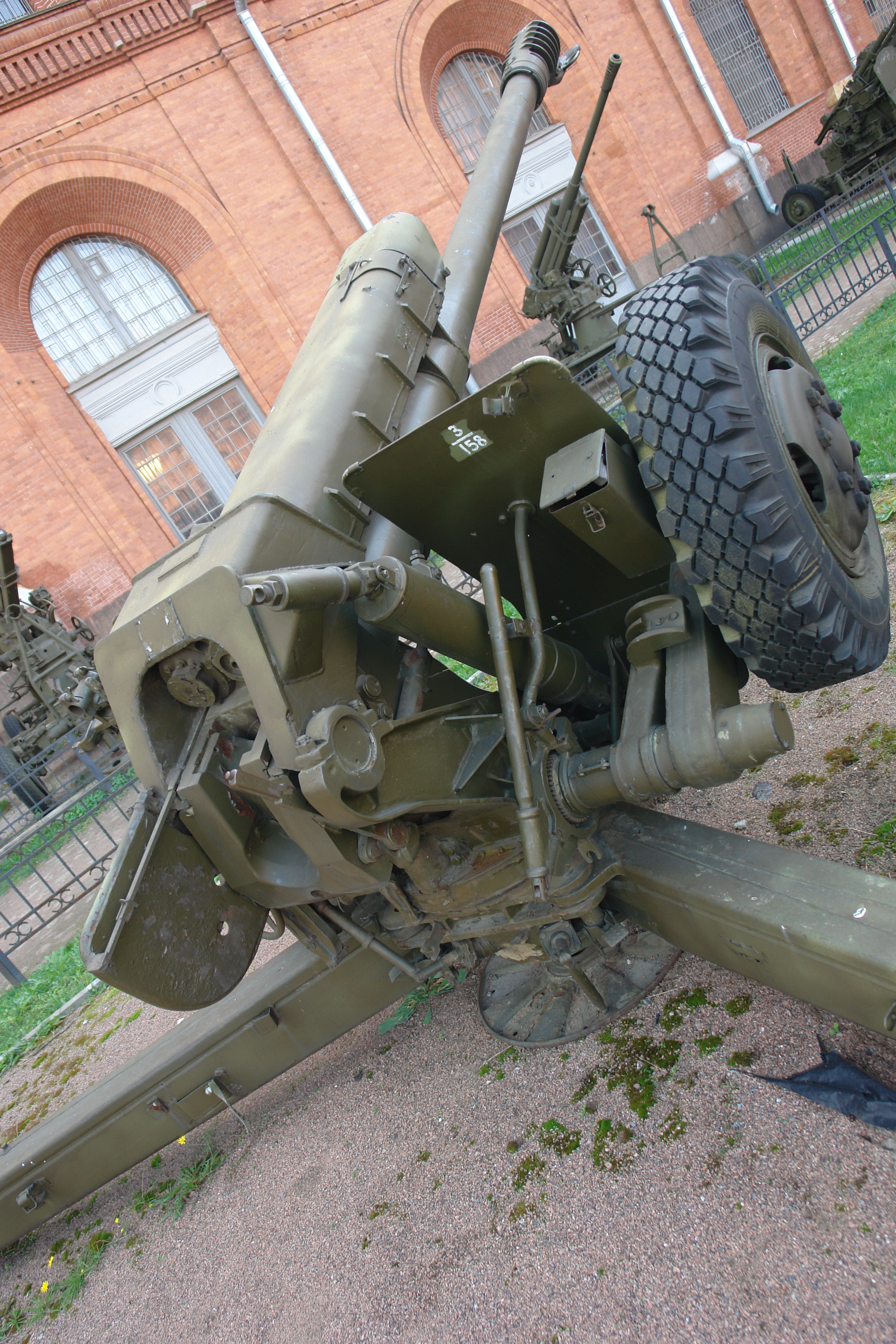 122mm Haubitze D-30 (2A-18) Chef-Designer FF Petrov (1960). Reichweite : 15300m Kadenz : 6-8 Schuß/min. Gewicht : 3200, Geschoßgewicht: 22 kg Bedienung : 6 Soldaten Quelle : Militär-Historisches Museum der Artillerie, Ingenieure und Signal Corps, St. Petersburg.